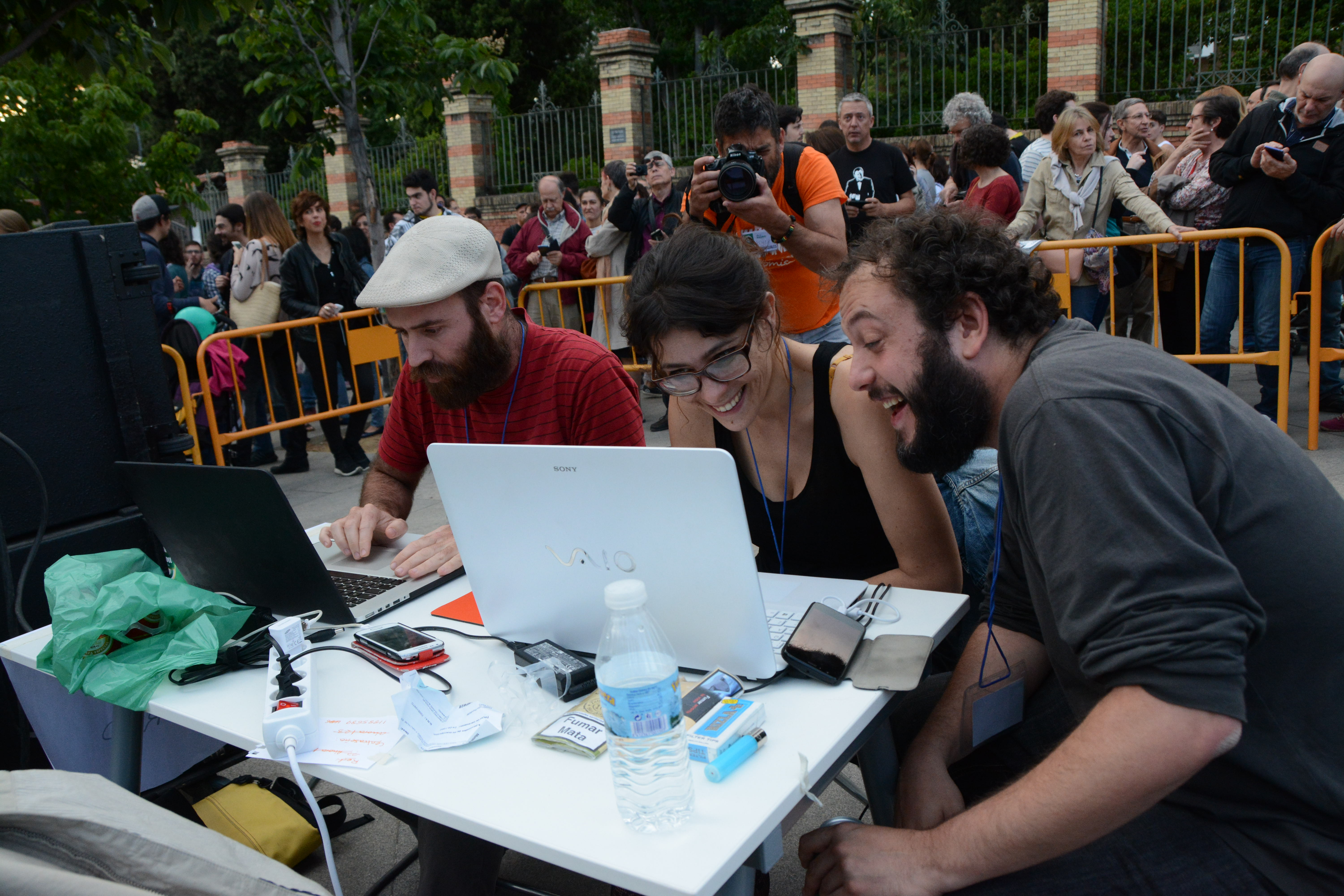 Noche electoral de Ahora Madrid el 24 de mayo de 2015 en la cuesta de Moyano. Foto de Myriam Navas